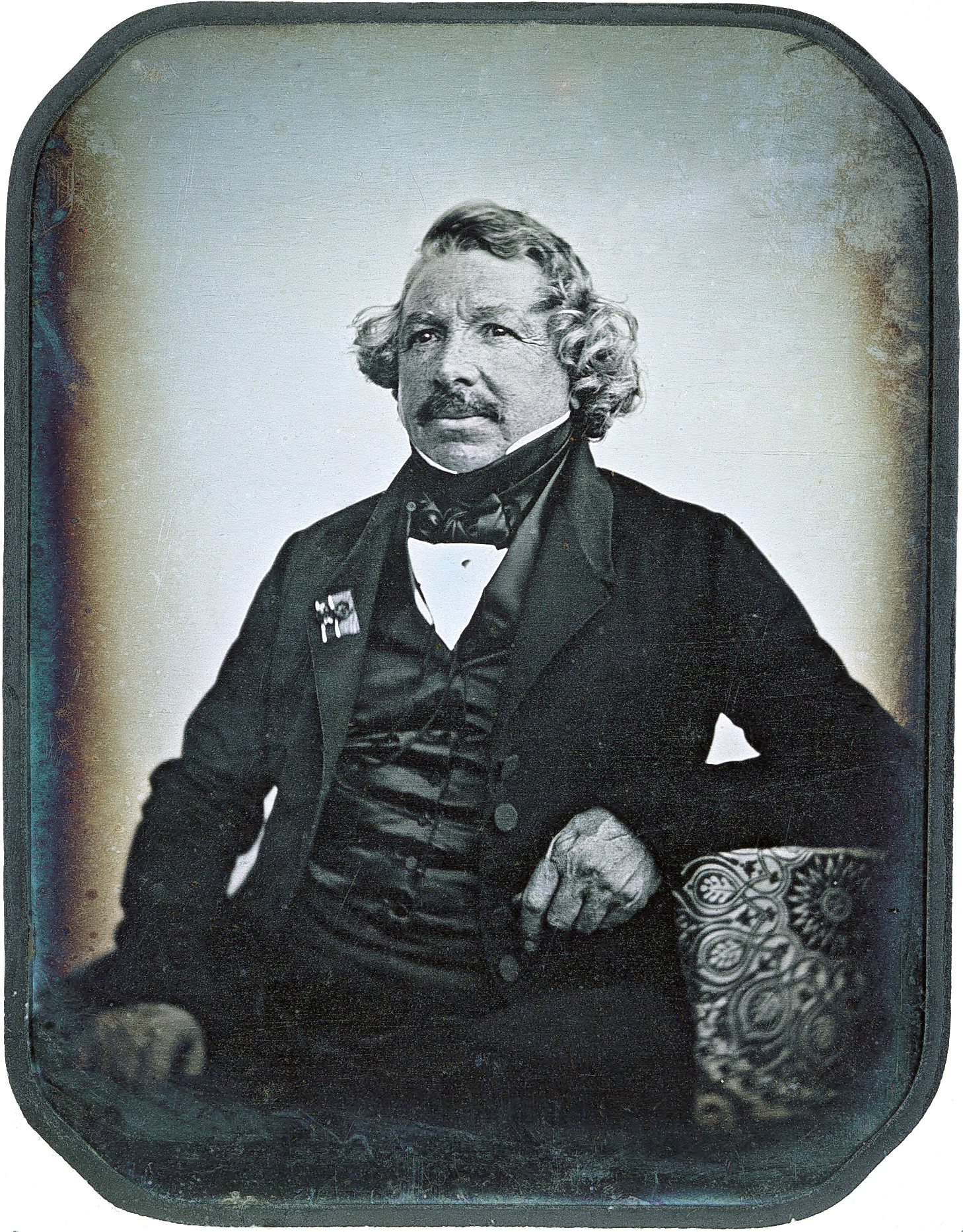 Portrait of Louis Daguerre (1787-1851)